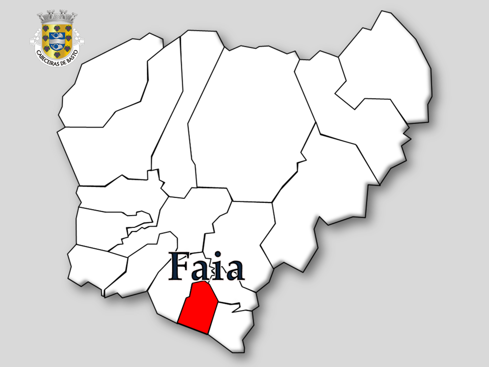 Censos 1864/2011